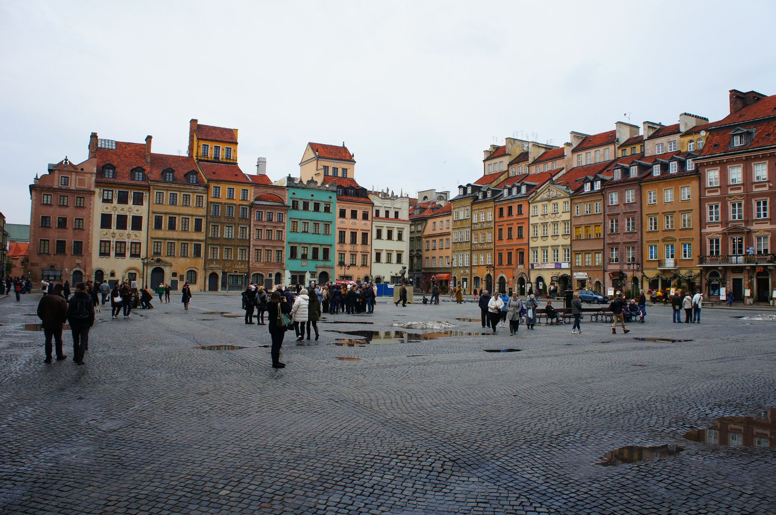 Warsaw Old Town, Warsaw, Poland